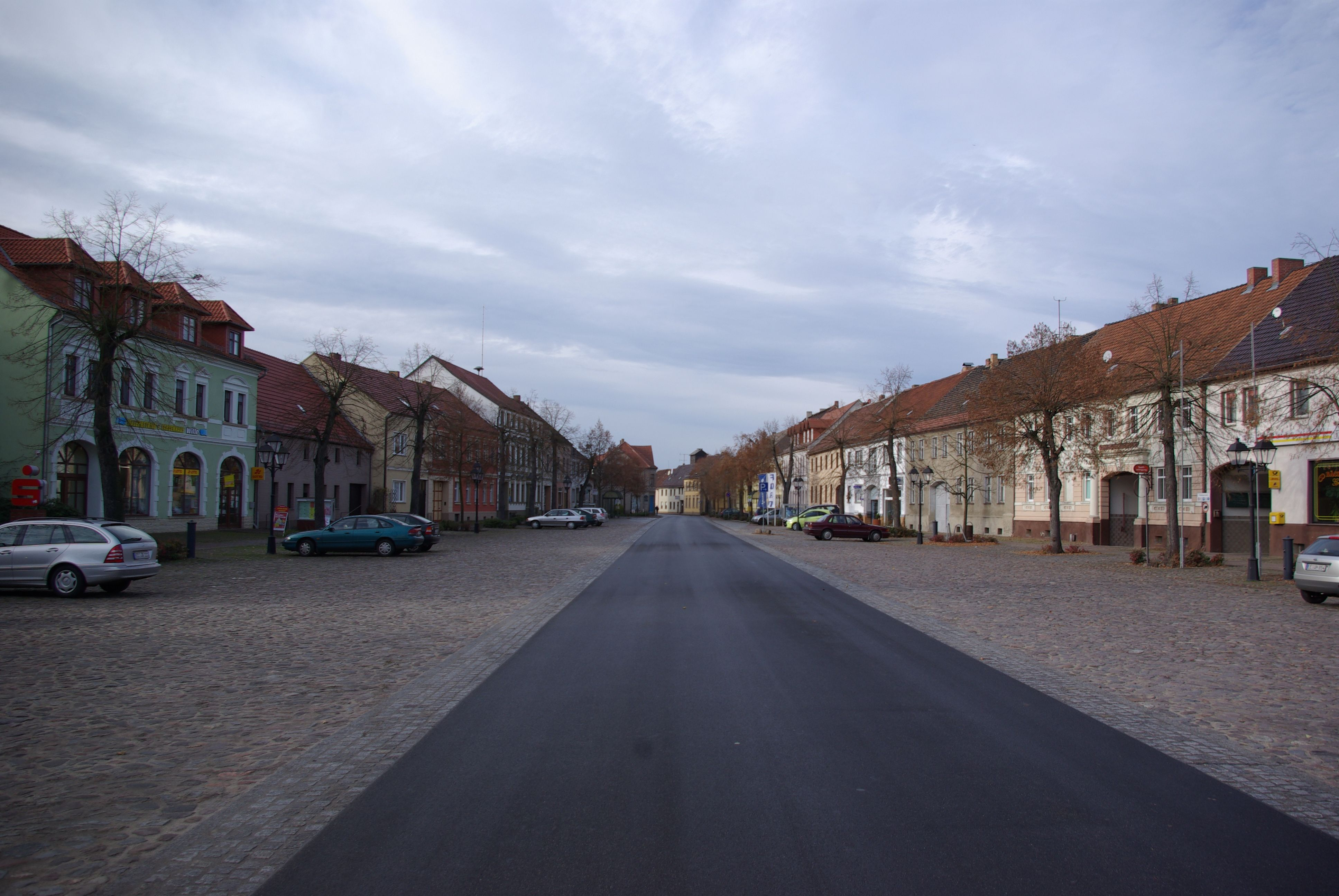 Schönewalde in Brandenburg. Der Stadtkern von Schönewalde steht unter Denkmalschutz.